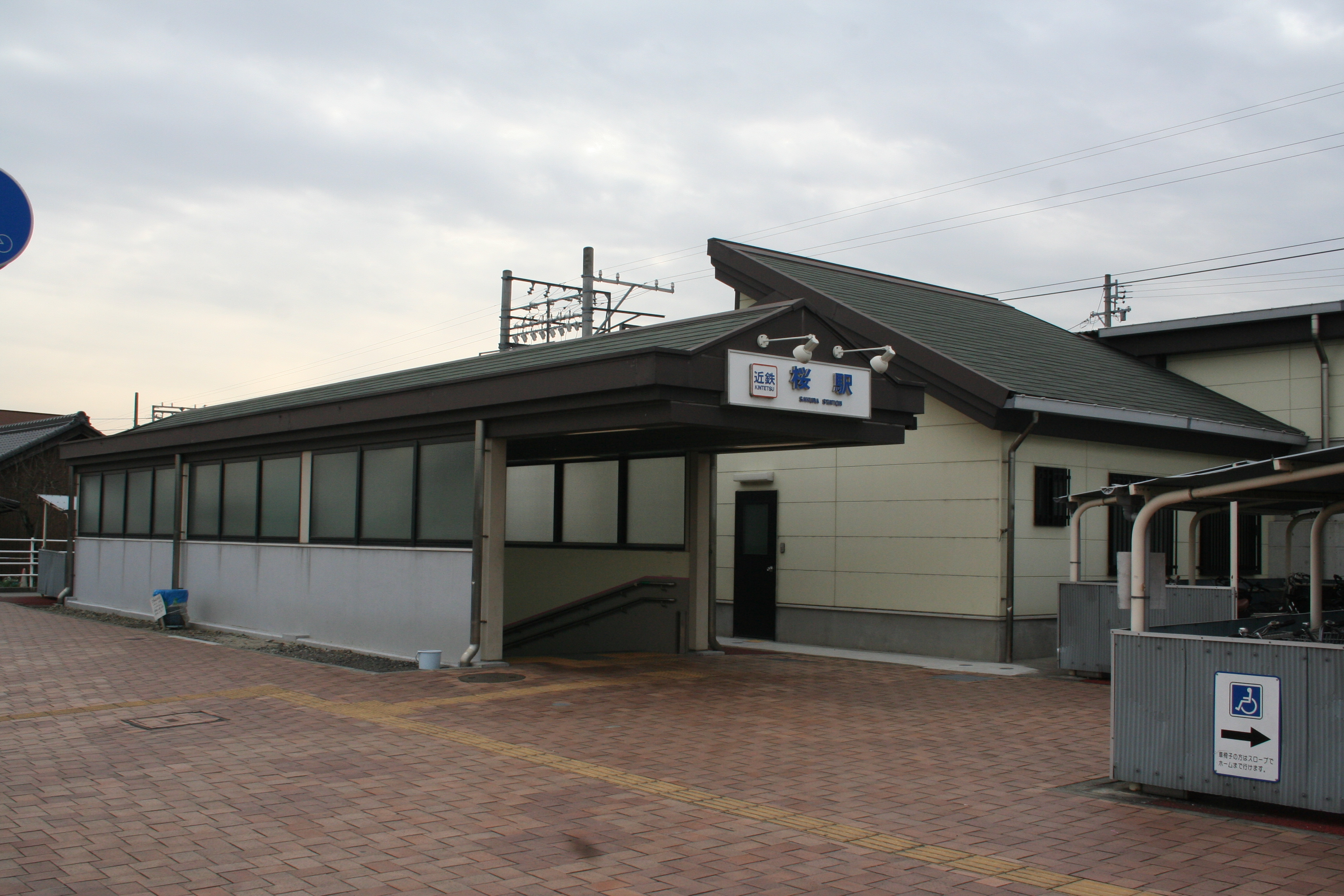 近鉄・桜駅